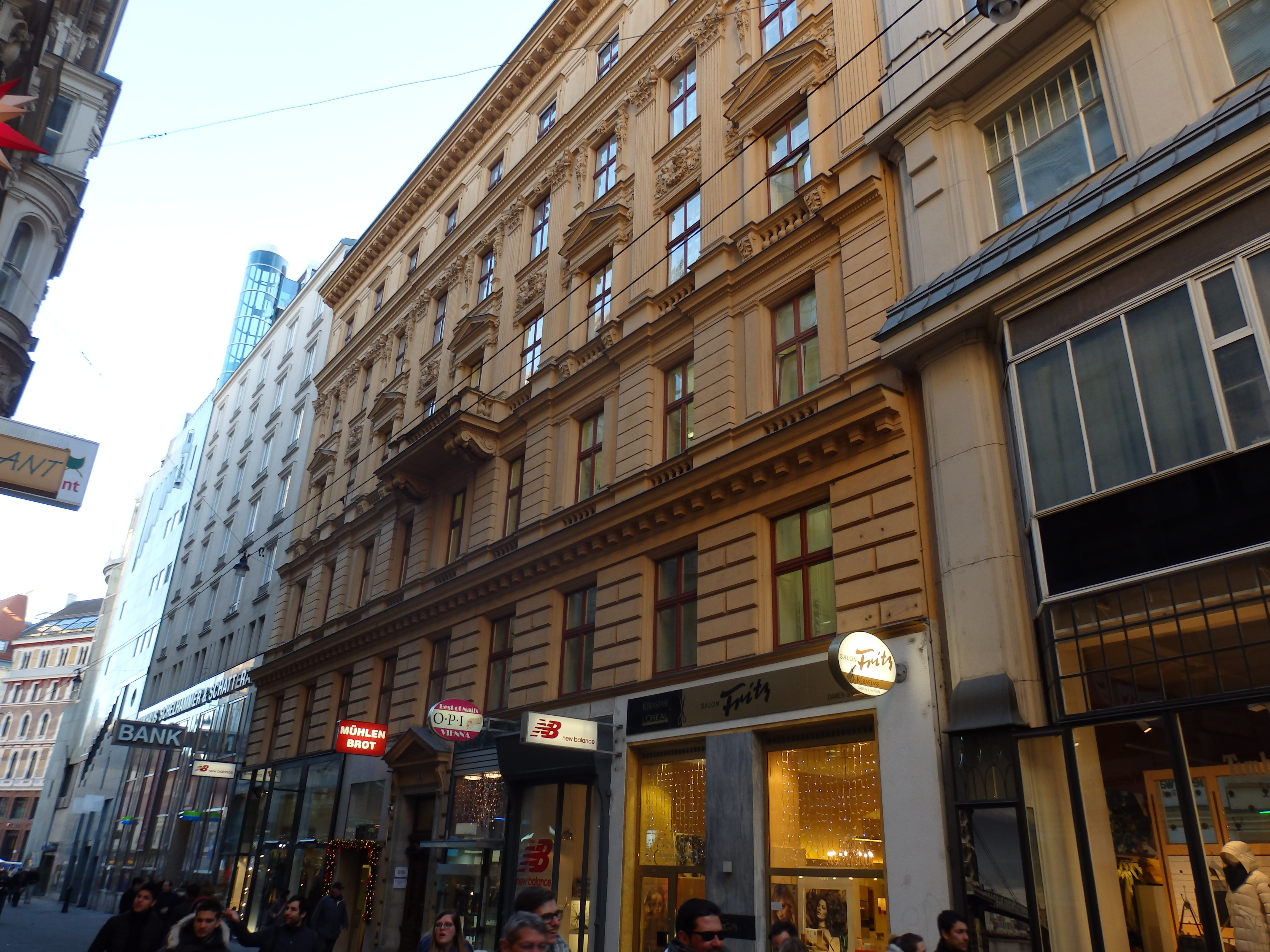 Wohn- und Geschäftshaus (1881) von Carl Schumann, Goldschmiedgasse 5, Wien-Innere Stadt